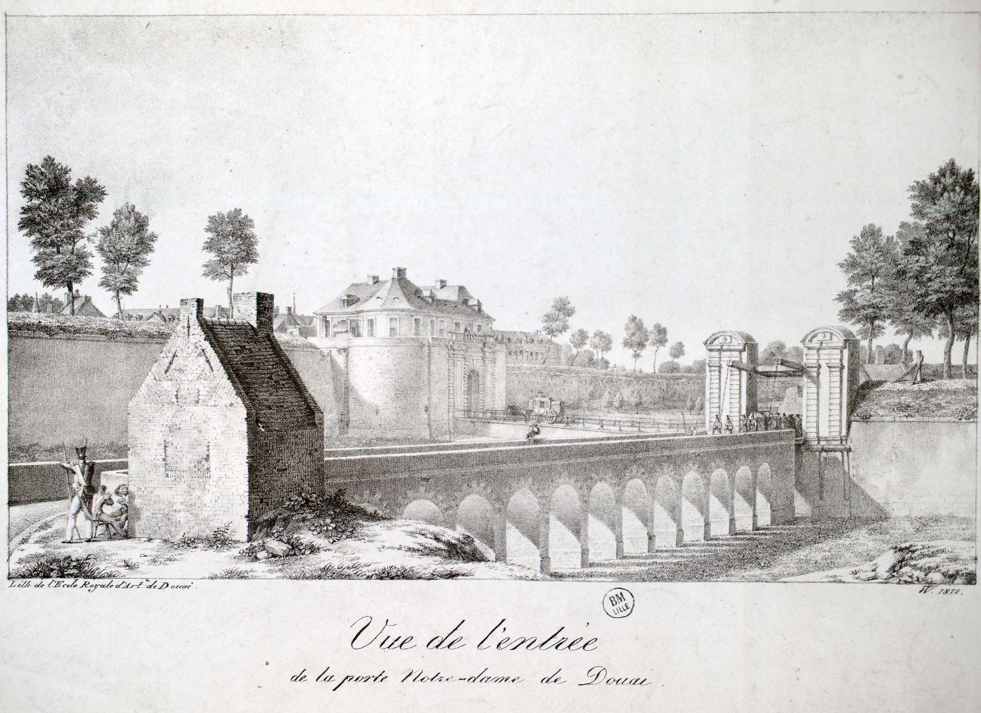 Titre du document : Vue de l'entrée de la porte Notre-Dame de Douai Cote Bibliothèque Municipale de Lille : carton 40, 9 Type de document : lithographie 30 x 47 cm Mention de l'auteur : Lithographie de l'Ecole Royale d'Art de Douai.